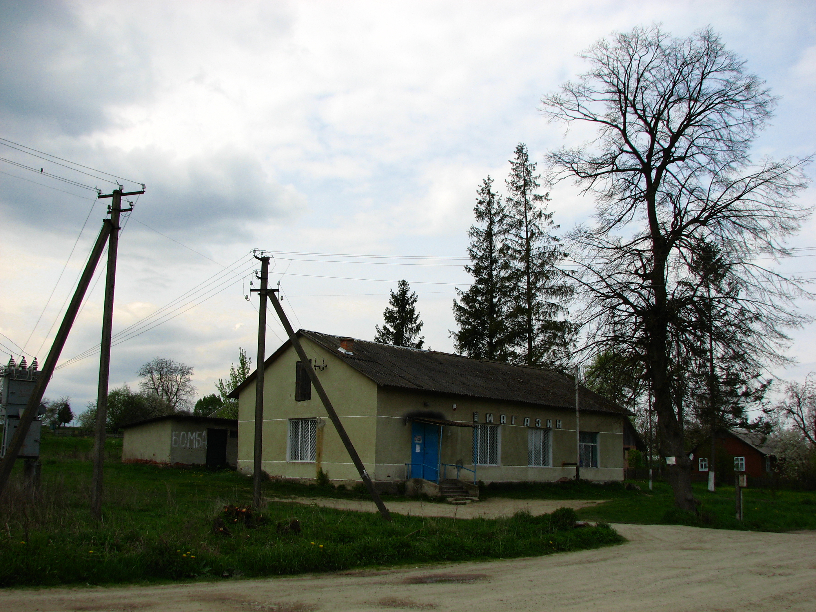 Магазин.